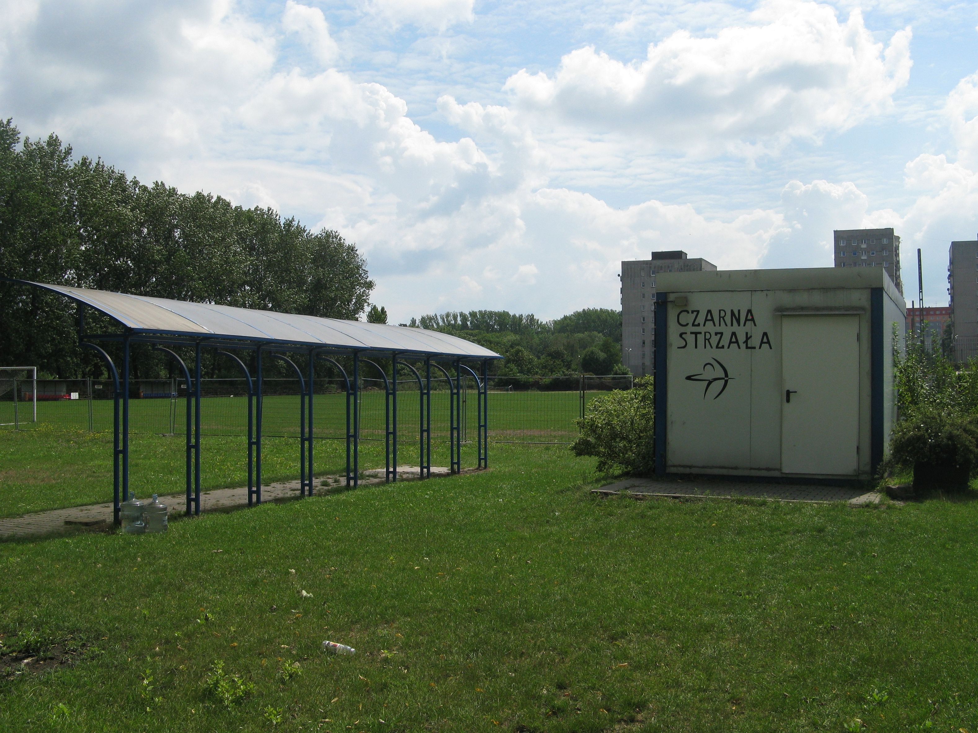 Teren łuczniczego Miejsko-Ludowego Klubu Sportowego Czarna Strzała, ul. Piłkarska, obok stadionu Polonii Bytom im. Edwarda Szymkowiaka.